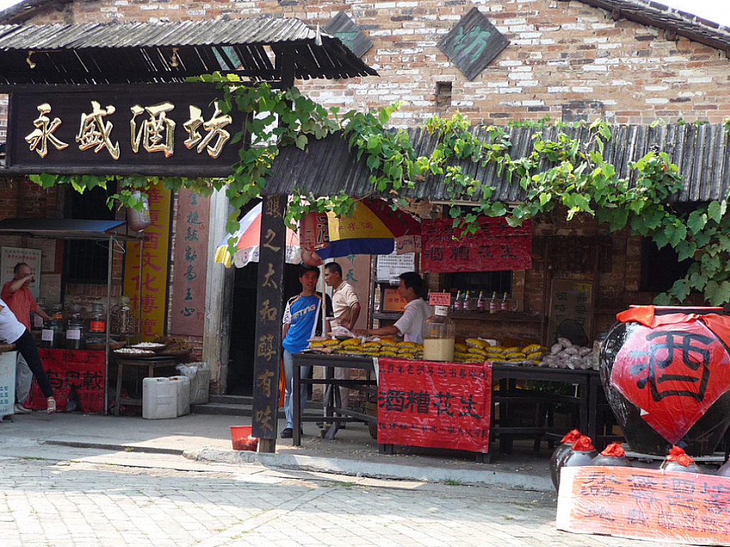 Viticulture traditionnelle en Chine avec conduite en treille d'une vigne sur la façade d'une échoppe